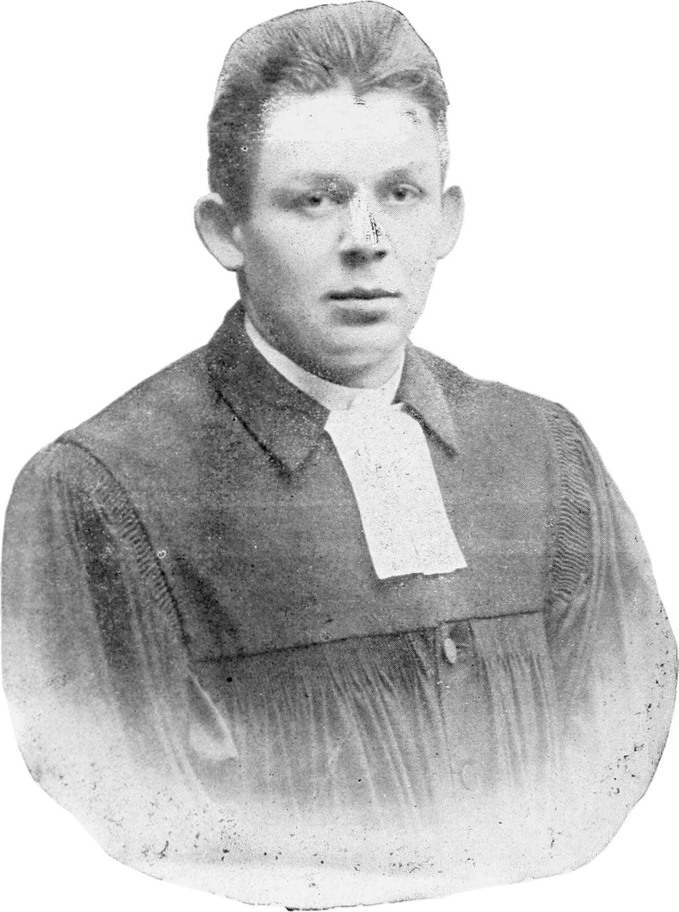 Hornjoserbsce: Hajno Rizo (1873–1917); serbski farar a składnostny basnik.